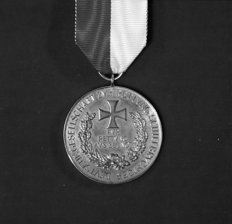 Orden im Besitz von Bundespräsident Walter Scheel Medaille für Rettung aus Seenot